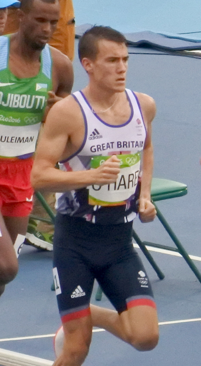 Rio 2016 - Eliminatórias 1500m Masculino